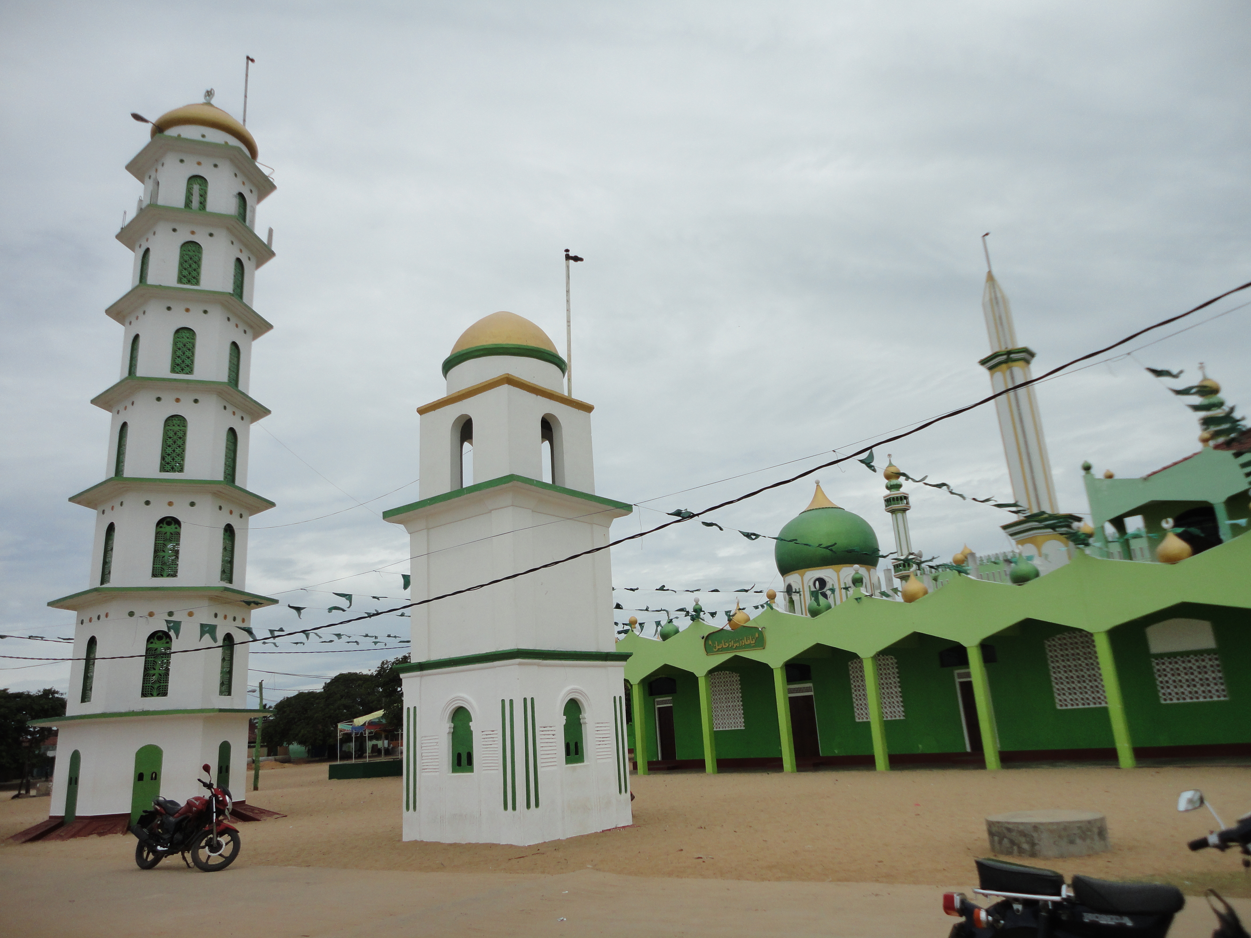 கல்முனைக்குடி நாகூர் ஆண்டகை தர்ஹாவின் அழகிய தோற்றம்